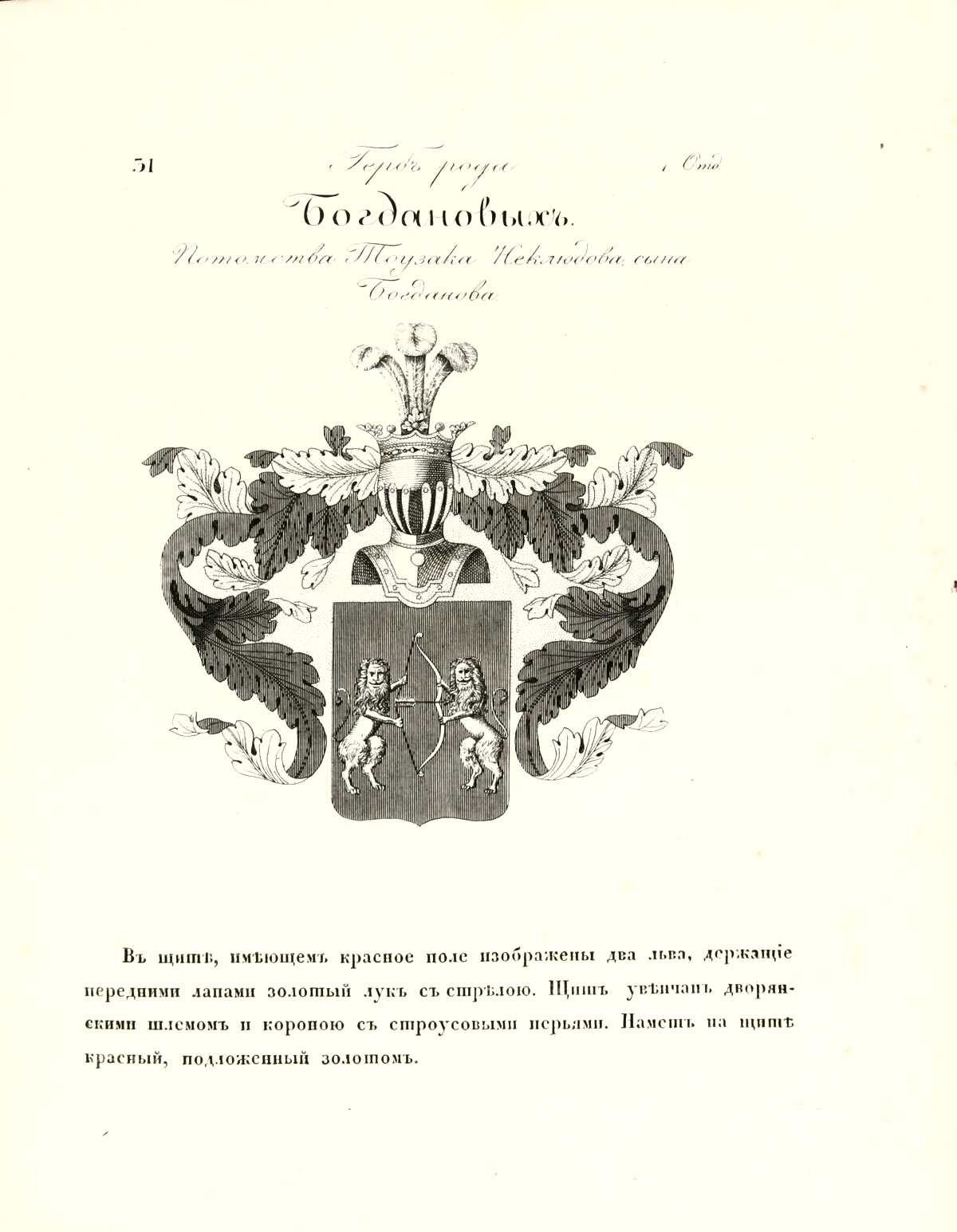 Герб княжого дворянського роду Тоузака Неклюдовича сина Богданова